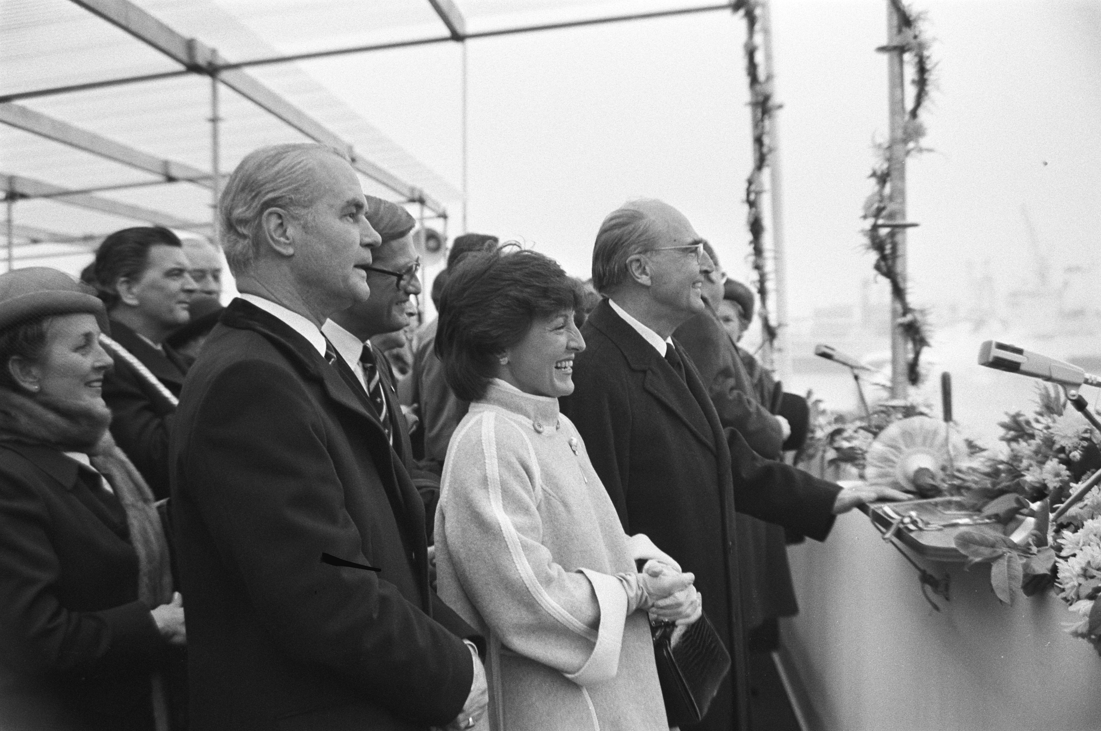 Collectie / Archief : Fotocollectie Anefo Reportage / Serie : [ onbekend ] Beschrijving : Prinses Margriet verricht doop en tewaterlating van de "ZEELANDIA" in Krimpen aan den IJssel , Van der Giessen - de Noord N.V. Datum : 17 maart 1980 Locatie : Krimpen aan den IJssel Trefwoorden : Tewaterlatingen Persoonsnaam : Margriet, prinses Instellingsnaam : Van der Giessen-De Noord Fotograaf : Dijk, Hans van / Anefo Auteursrechthebbende : Nationaal Archief Materiaalsoort : Negatief (zwart/wit) Nummer archiefinventaris : bekijk toegang 2.24.01.05 Bestanddeelnummer : 930-7262